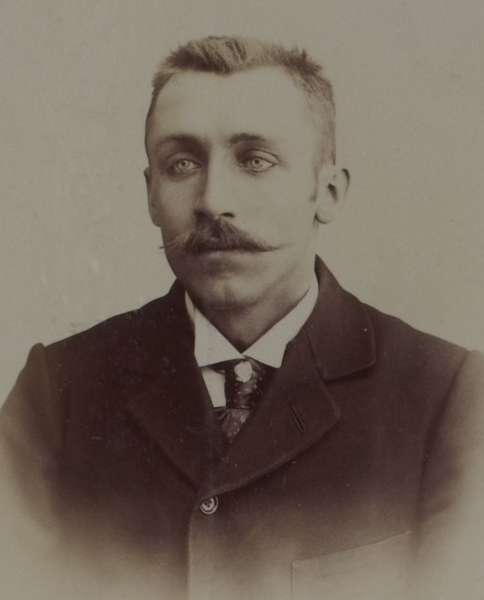 [Collection Jules Beau. Photographie sportive] : T. 12. AnnÃ©es 1899 et 1900 / Jules Beau : F. 50. Baras ; [Sans titre]